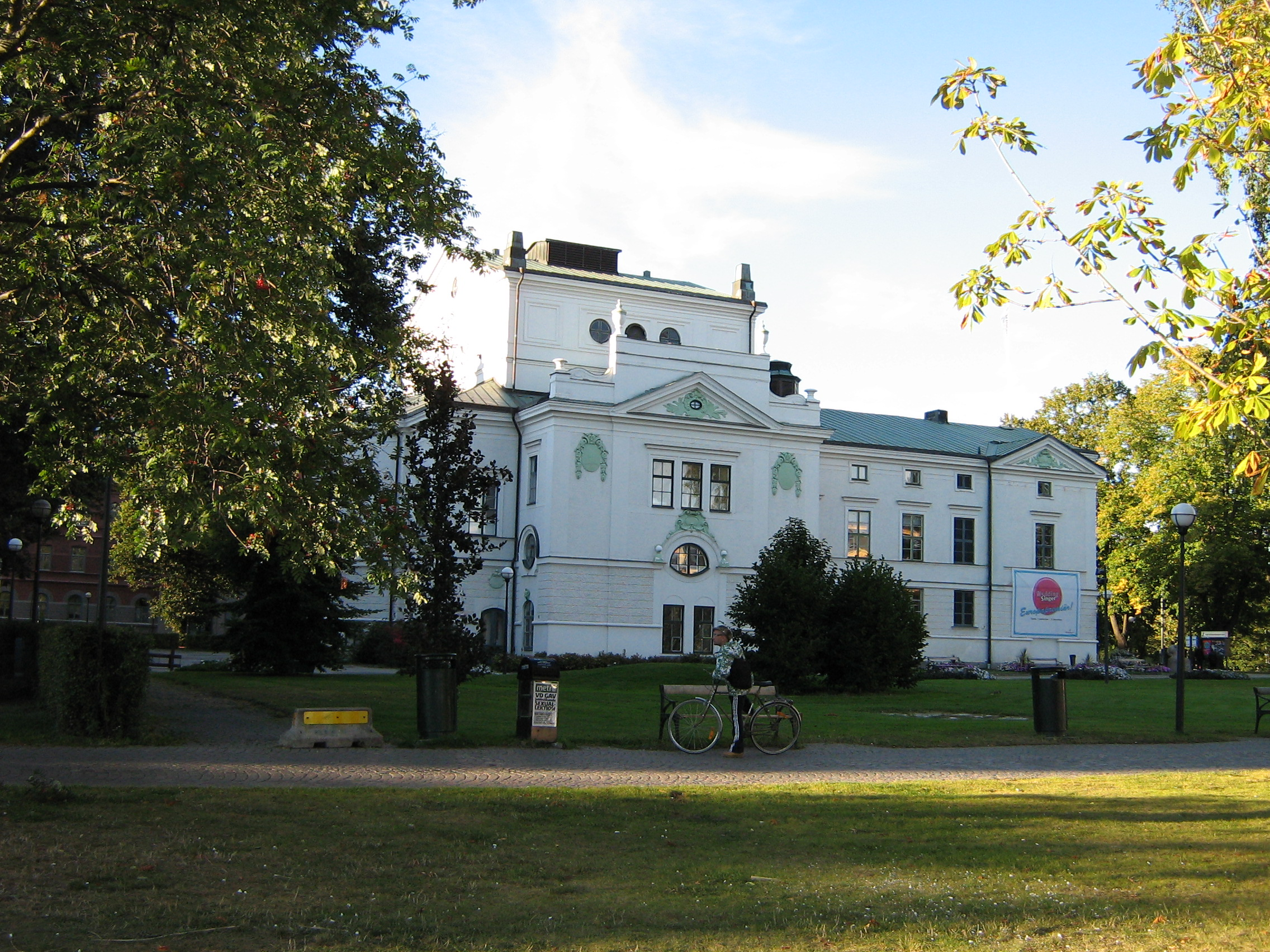 Karlstads teater